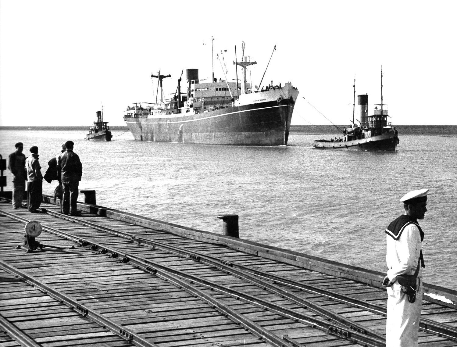 Barco Urmston Grange arribando a Puerto Cuatreros